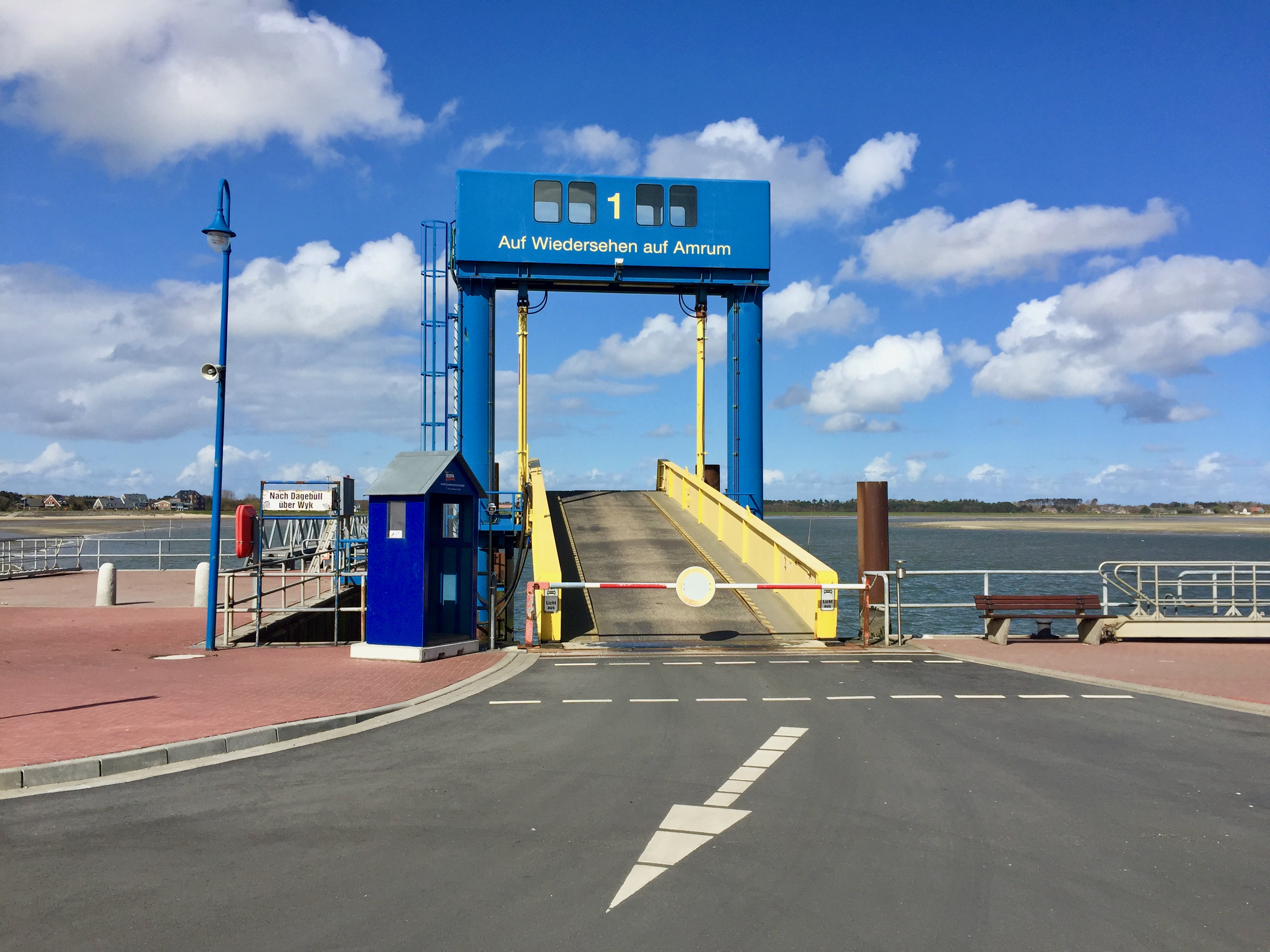 Der Fähranleger von Wittdün